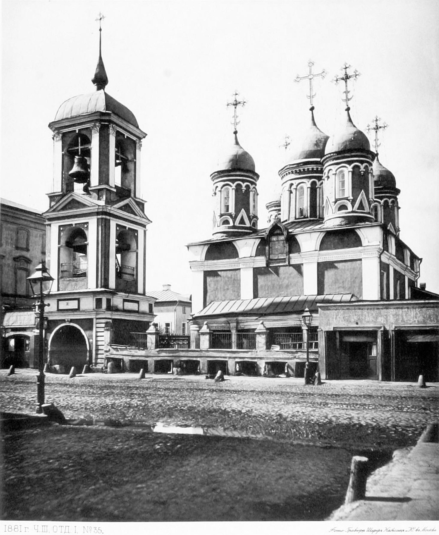 Храм Троицы Живоначальной в Листах